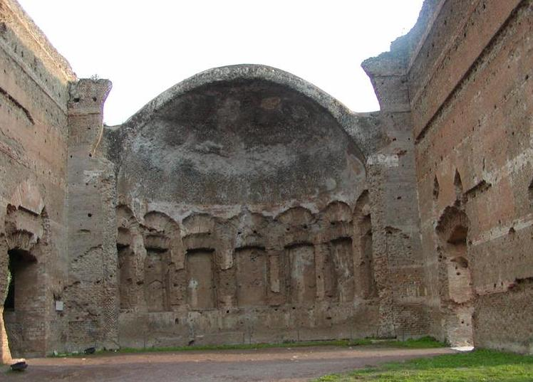 Salle des Philosophes, villa Adriana Auteur : Guilhem Dulous